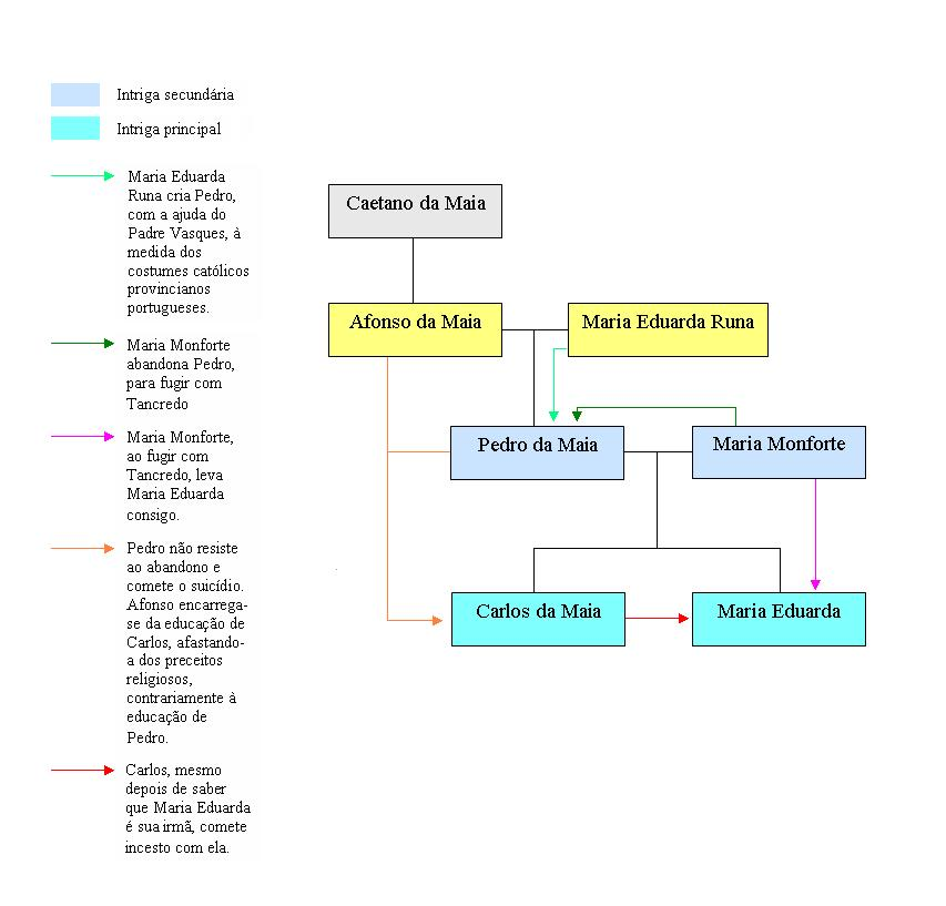 Árvore genealógica da família Maia de Os Maias de Eça de Queirós.